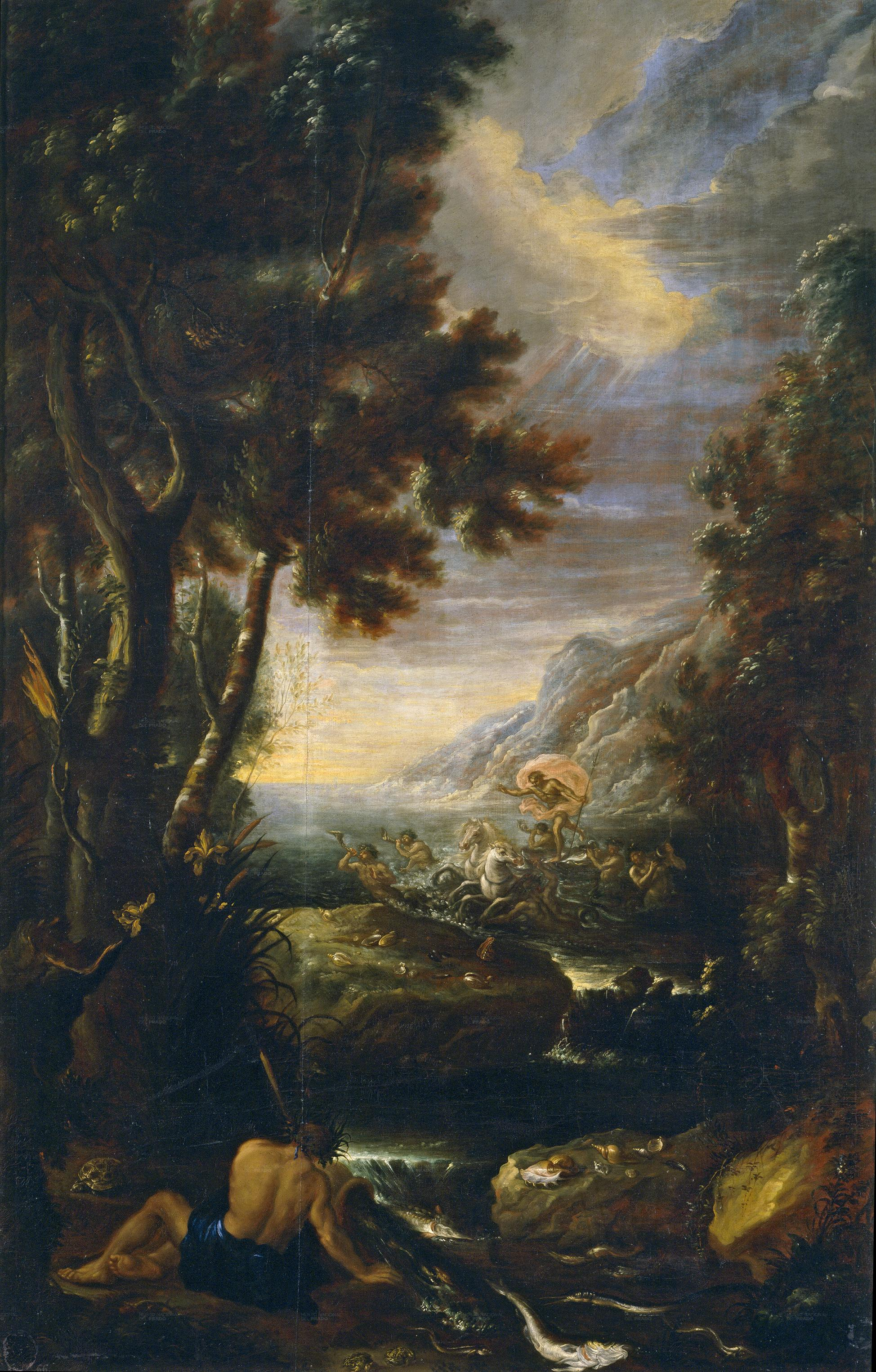 Jerónimo Ezquerra, Alegoria del Agua, óleo sobre lienzo (248x160 cm.) Madrid, Museo del Prado.